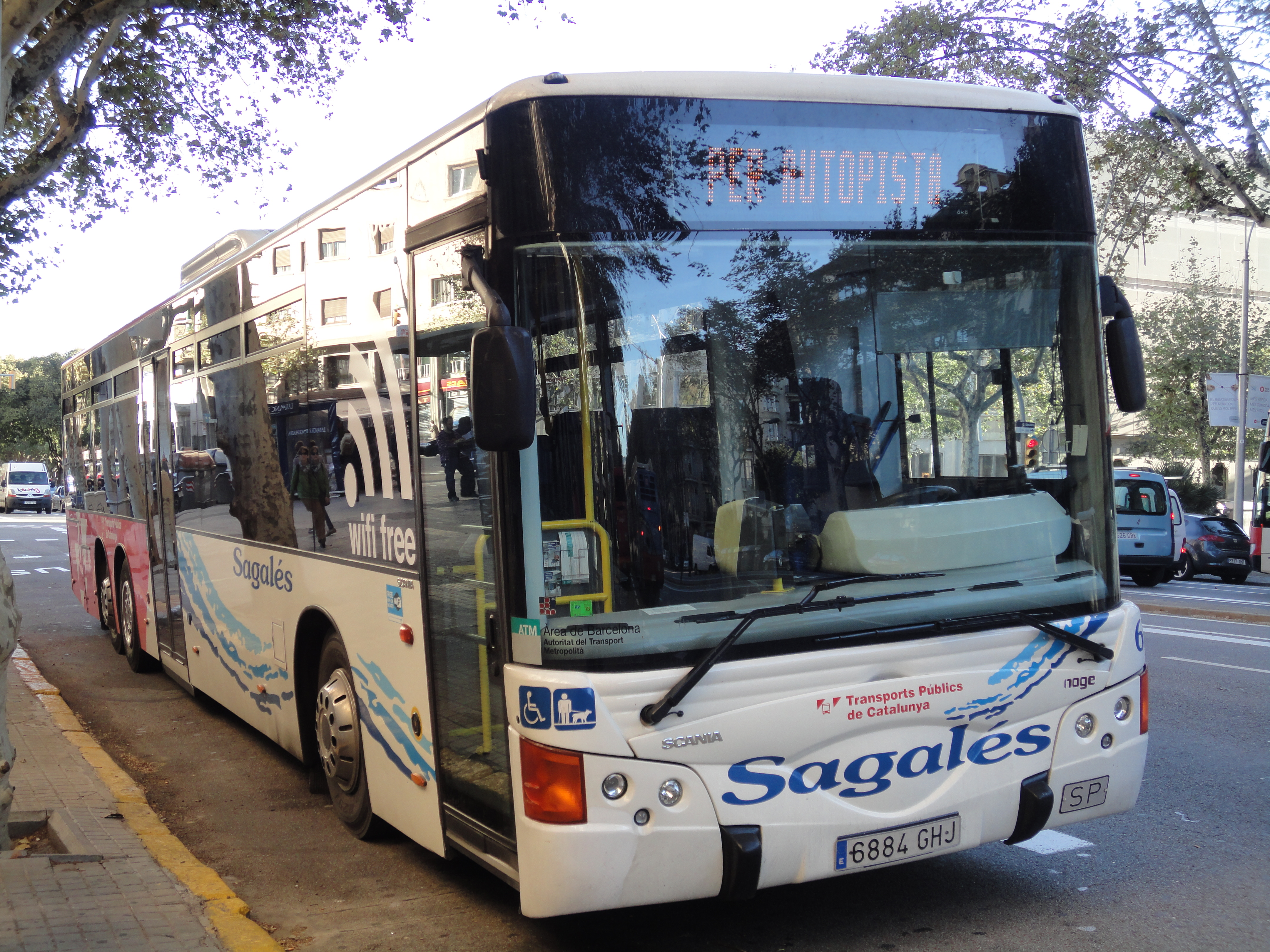 Autobús interurbà a Barcelona (Pg. Sant Joan)